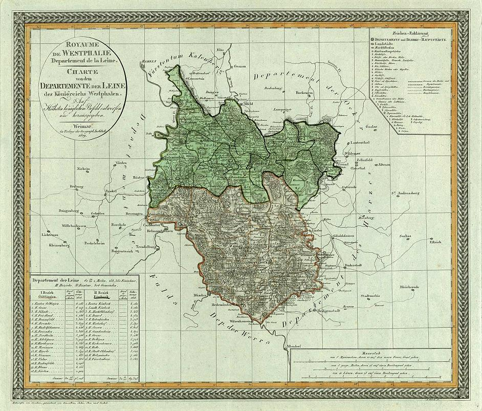 Charte von dem Departement der Leine des Königreichs Westpahlen